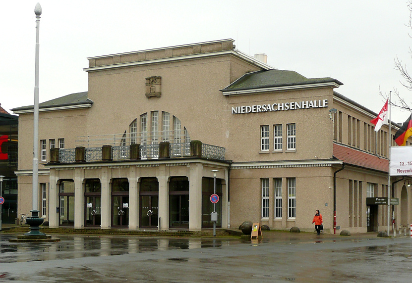 Niedersachsenhalle